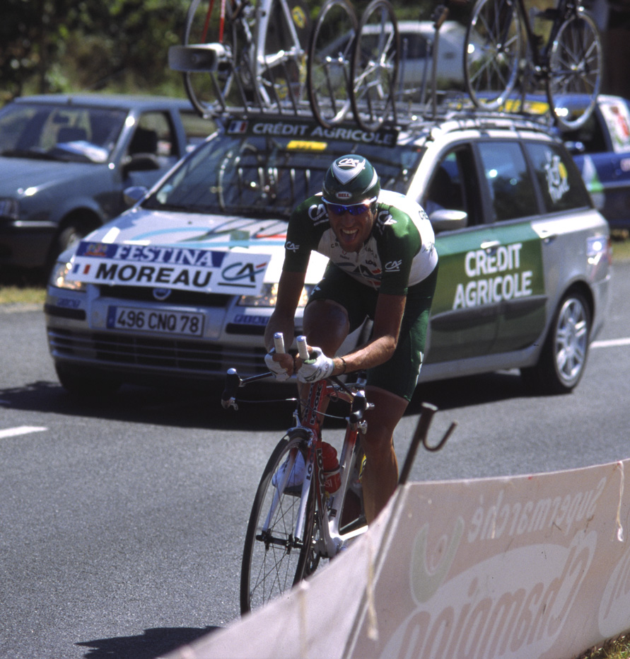 Christophe Moreau Tour de France 2003, individual time trial/contre-la-montre/Zeitfahren Gaillac